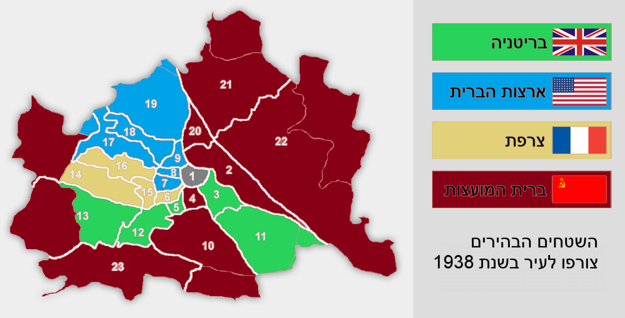 חלוקת וינה לאחר מלחמת העולם השנייה